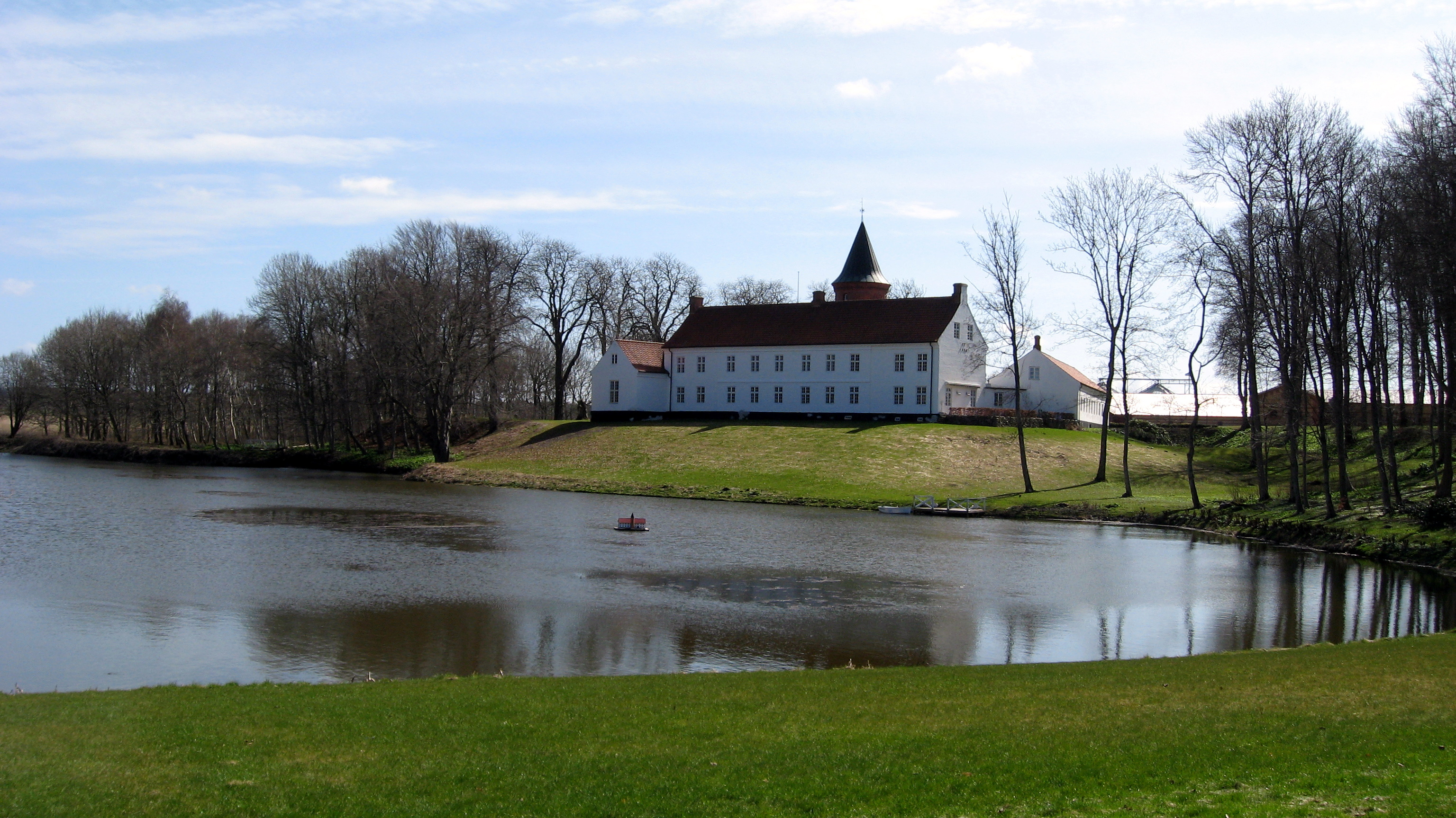 Høgholt herregård, Hørmested Sogn, Hjørring Kommune